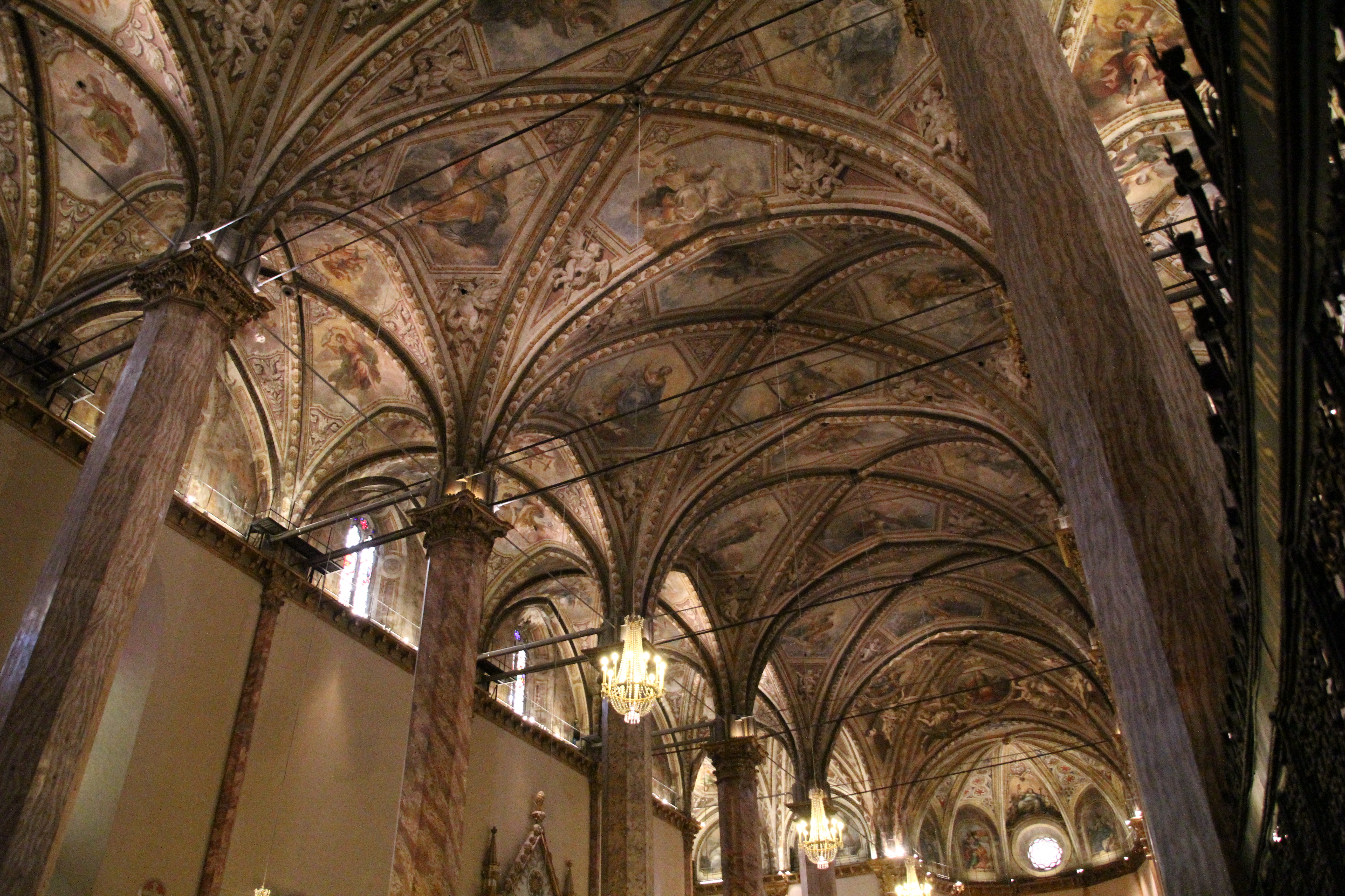 Perugia, cattedrale di San Lorenzo